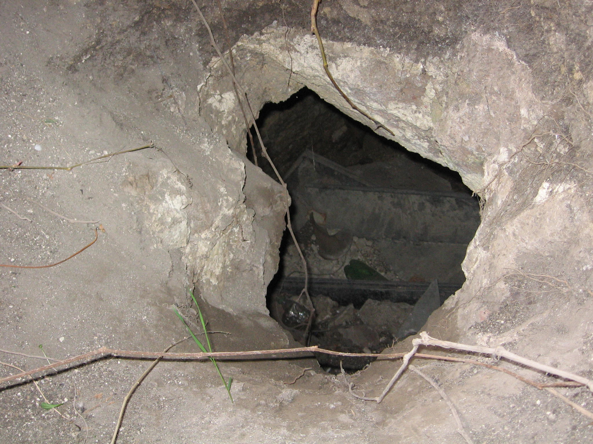 Усипальниця Ценських у Вікні на Покутті. Крипта крізь пробоїну у підлозі каплиці.